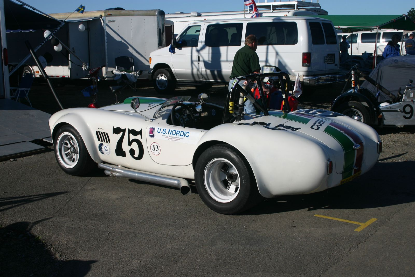 1965 AC Cobra 427